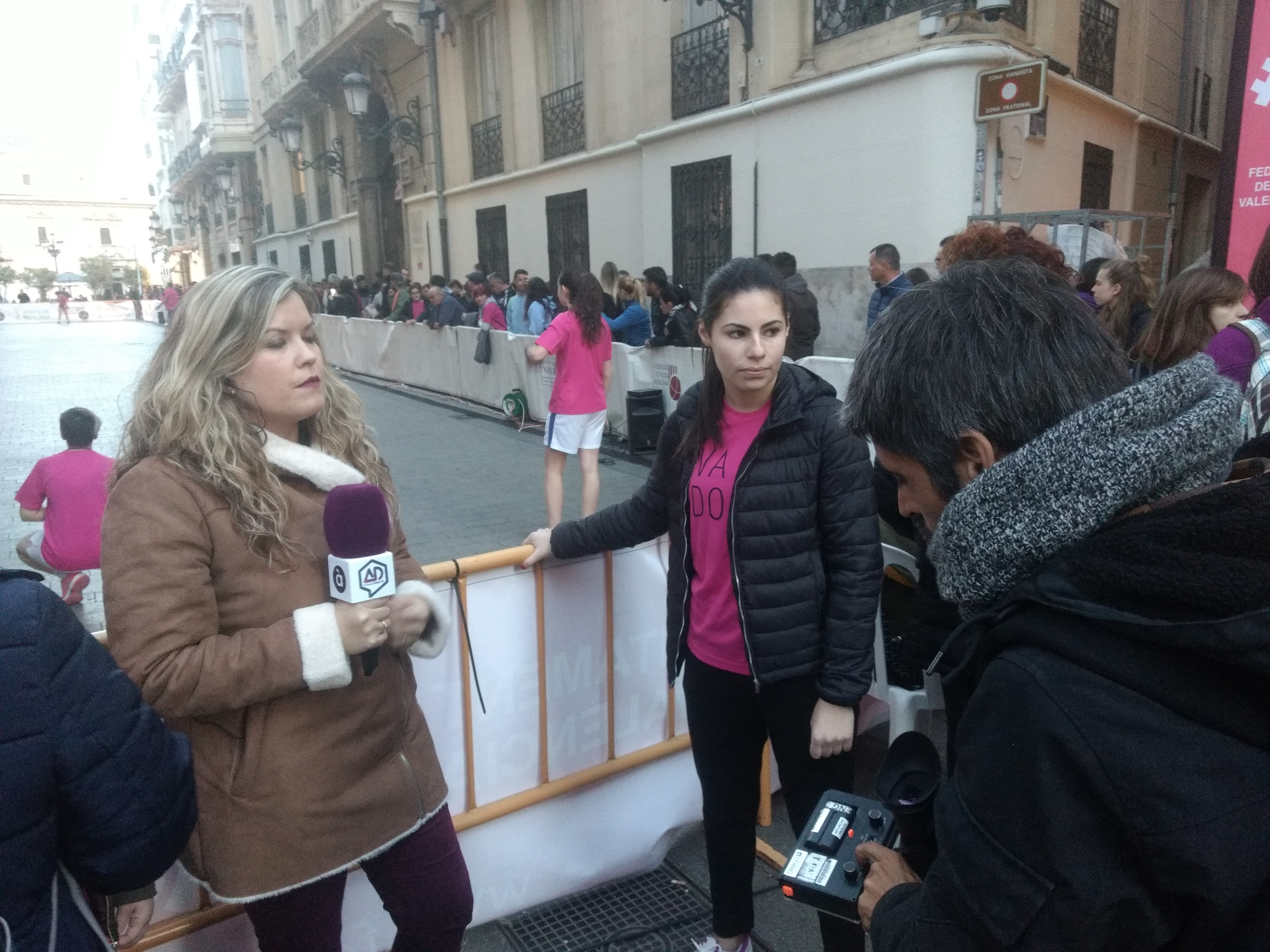 À Punt Directe entrevista a Mar de Bicorb en el Va de Dona de 2019.